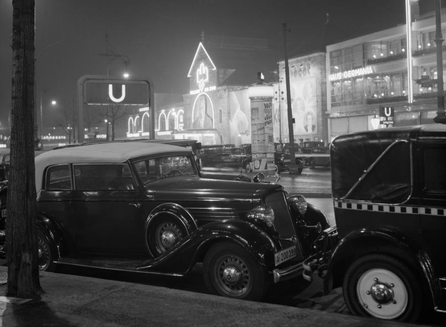 Berlijn. Nachtopname van de Hardenbergstrasse met een toegang tot de U-bahnhalte Zoologische Garten en het feestelijk verlichte cafe-restaurant Wilhelmshallen met de Ufa-bioscoop Palast am Zoo. Nummer archiefinventaris: bekijk toegang 2.24.14.02 Bestanddeelnummer: 191-0464